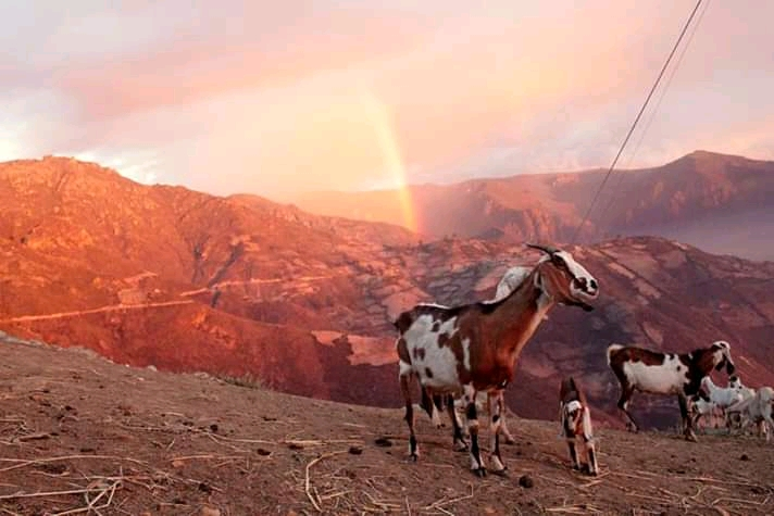 ganado en el Distrito de Pampas Grande con el atardecer de fondo